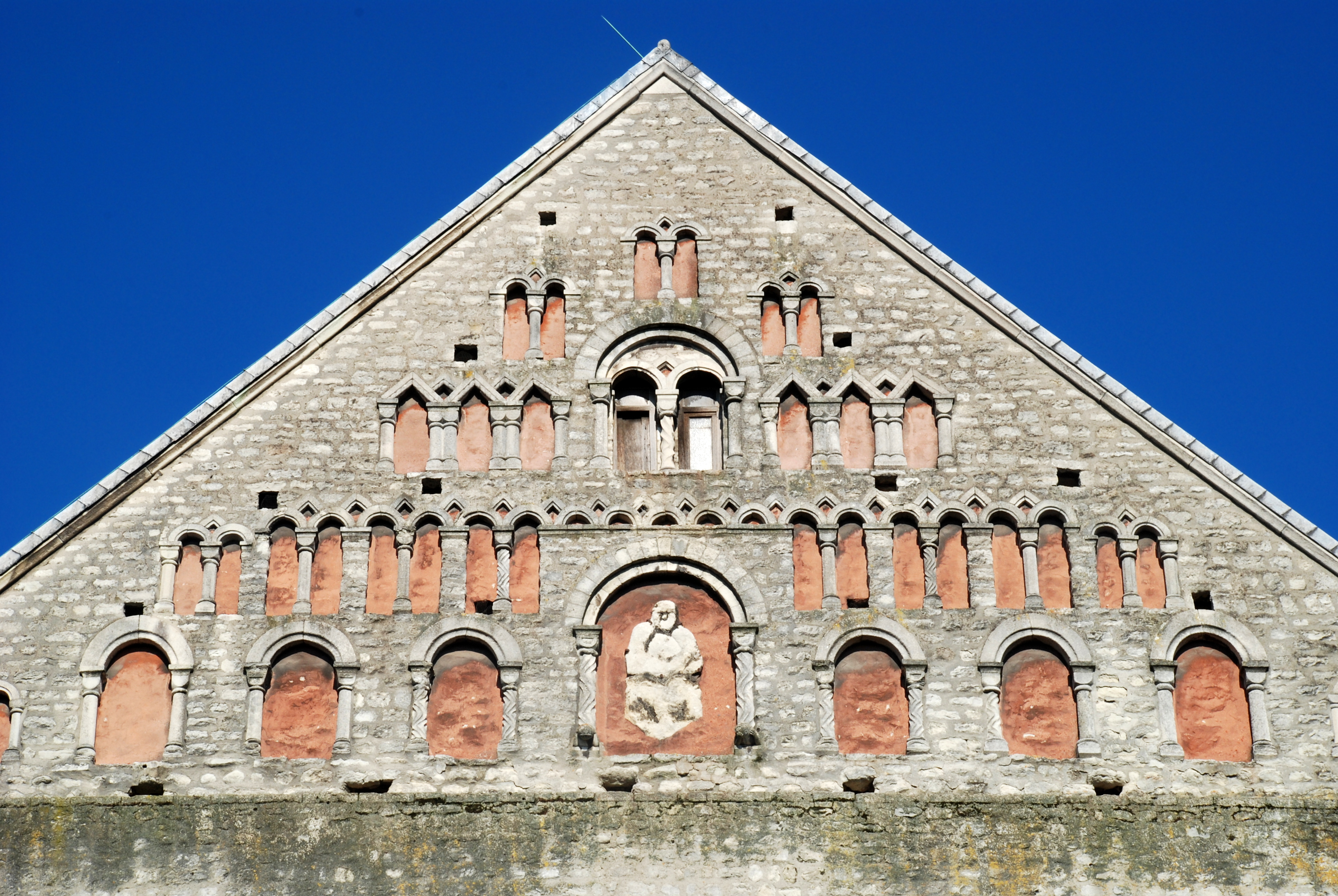 Belgique - Brabant wallon - Nivelles - Collégiale Sainte-Gertrude